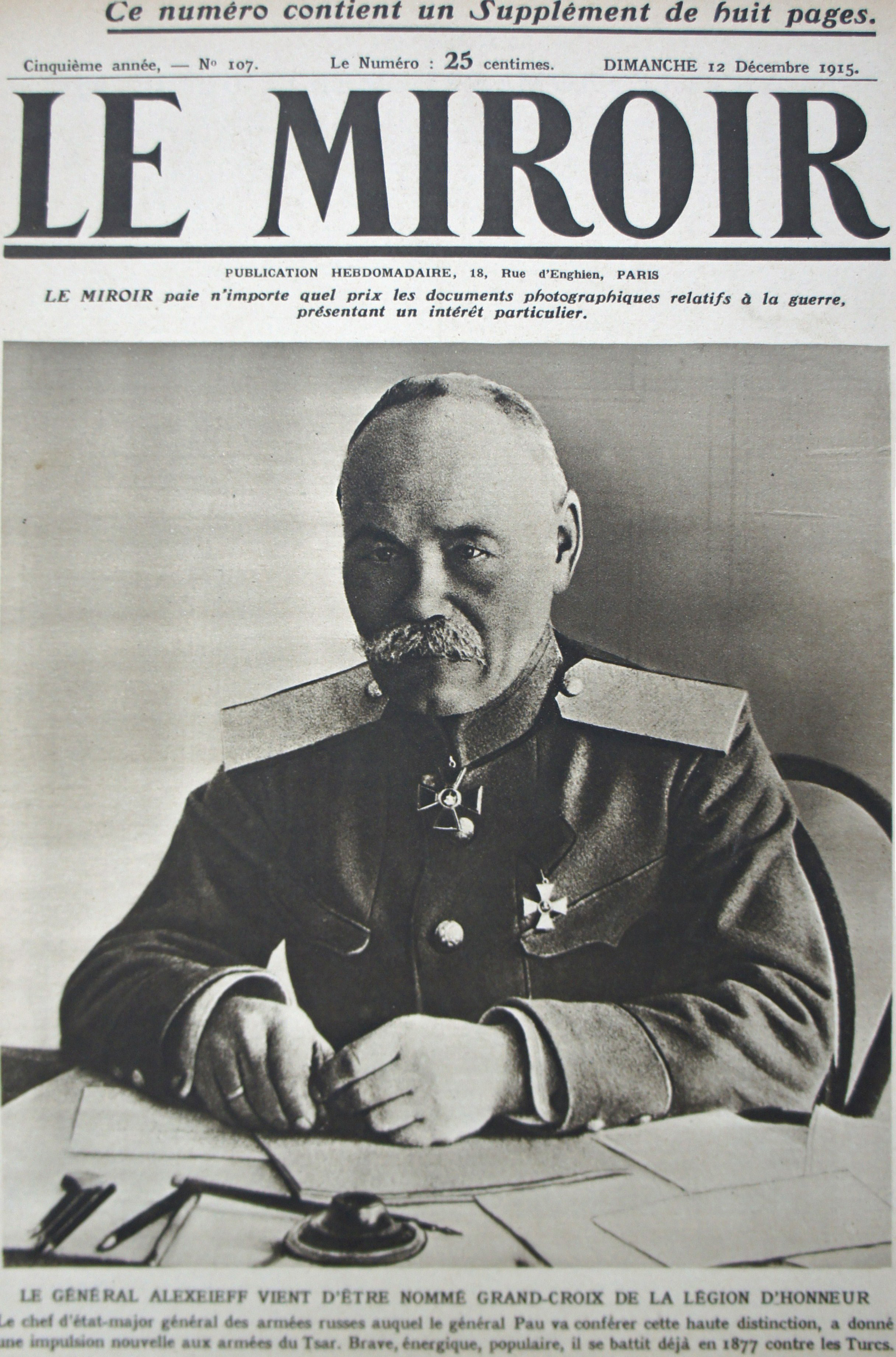 Couverture du journal le Miroir N° 107août 1915 le général Alexeïeff reçoit la Grand-croix de la Légion d'honneur des mains du général Pau.